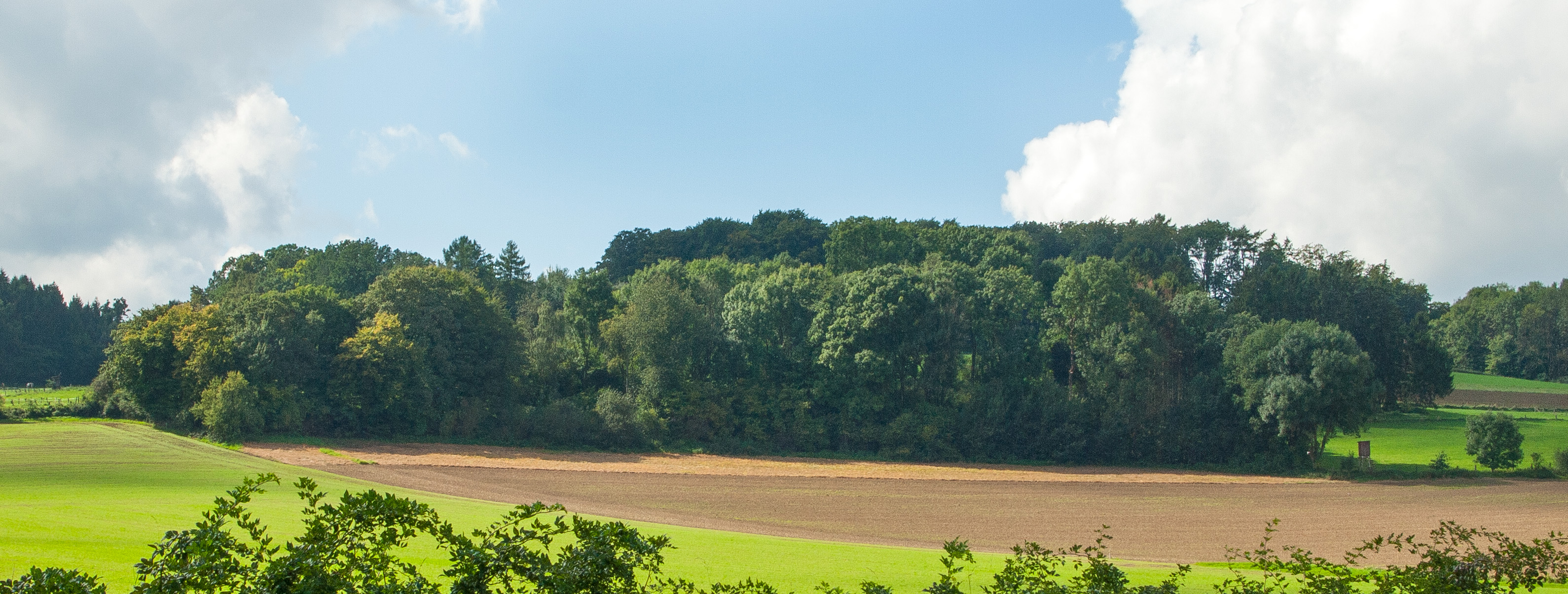 Landschaftsschutzgebiet Wald- und Wiesenkomplex Münterburg, Gemeinde Lage, Kreis Lippe, Nordrhein-Westfalen (Ansicht von Nordosten).